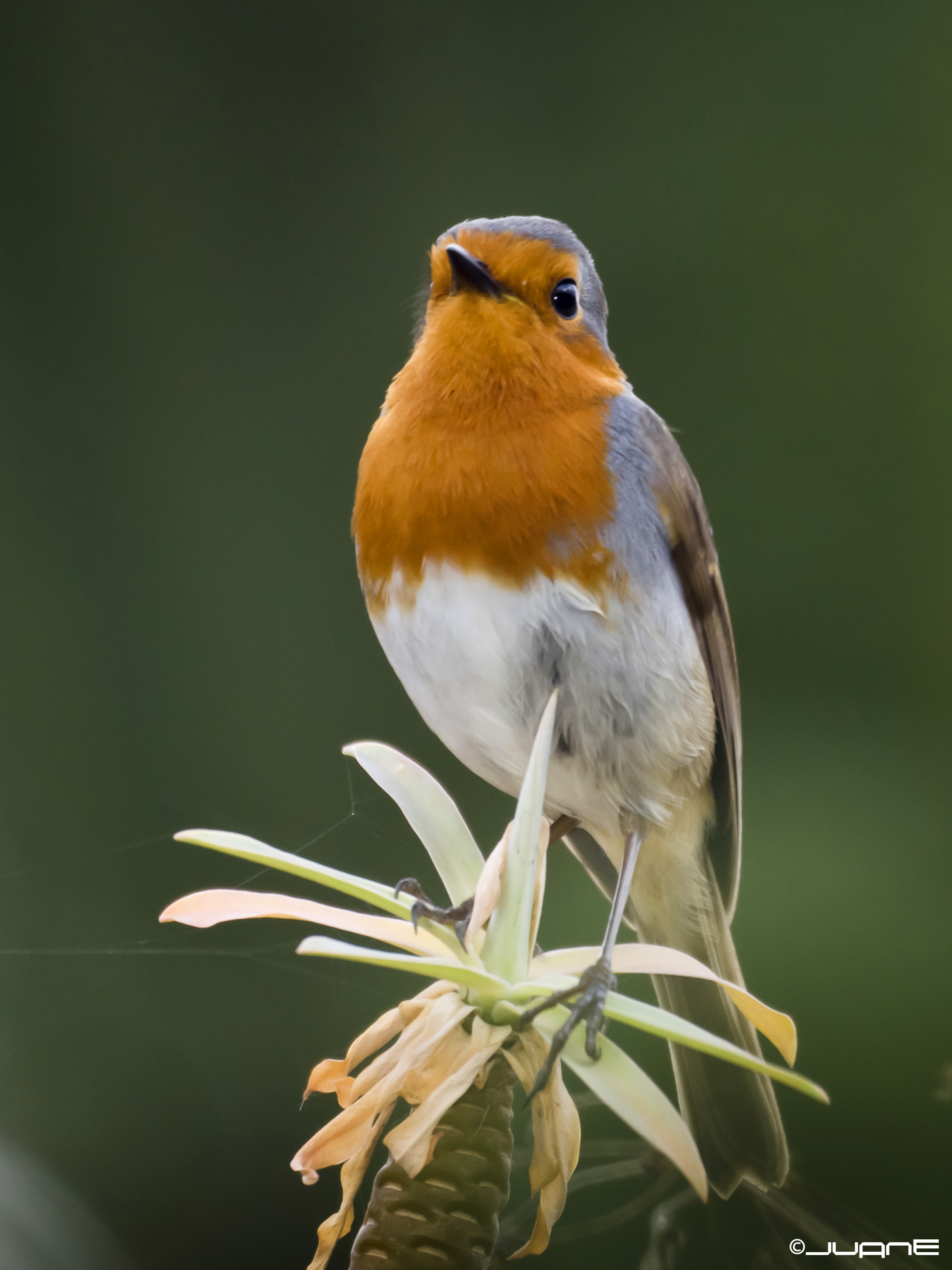 Petirrojo (Erithacus rubecula superbus )